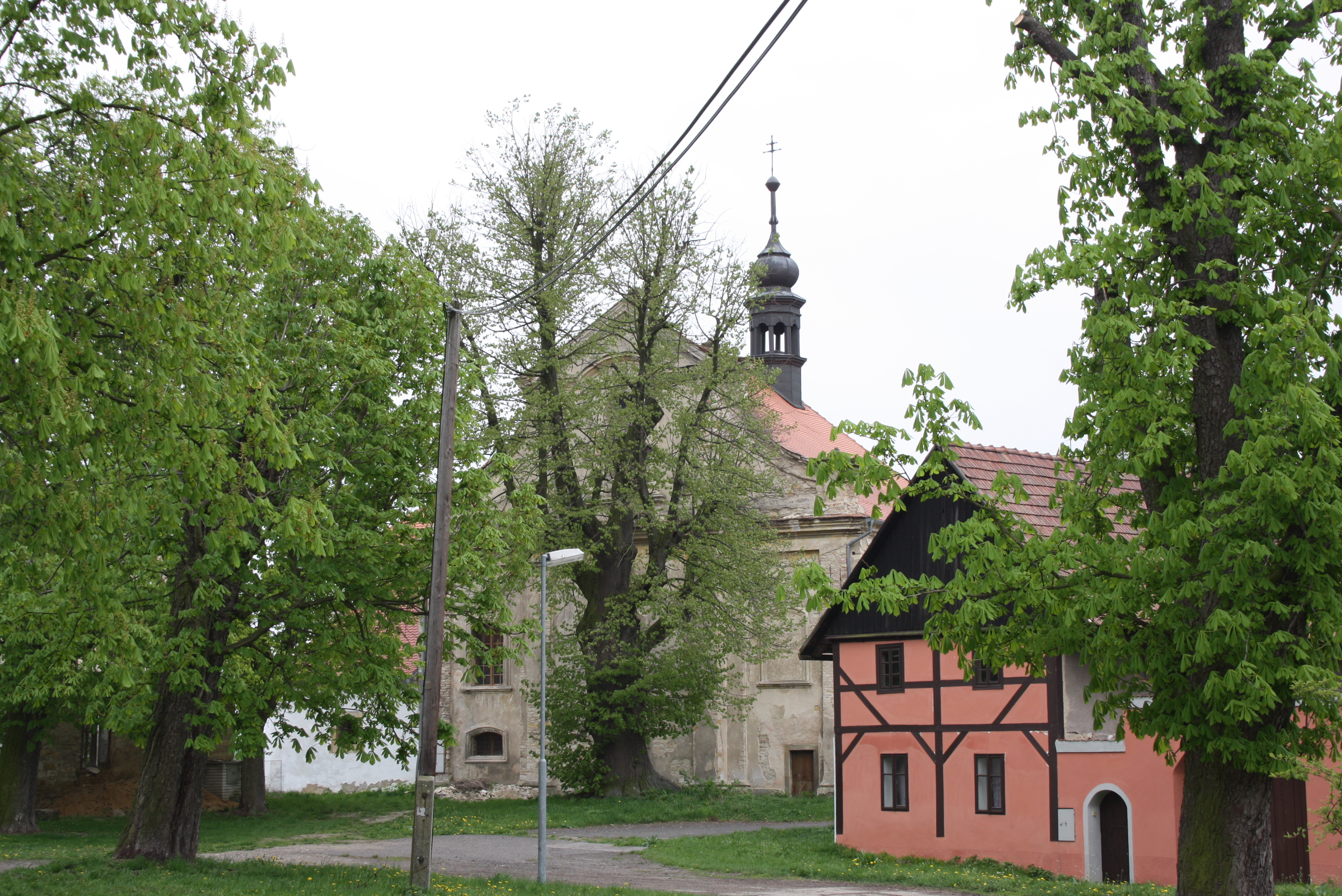 Kostel Narození Panny Marie v Hrušovanech, části Polep.